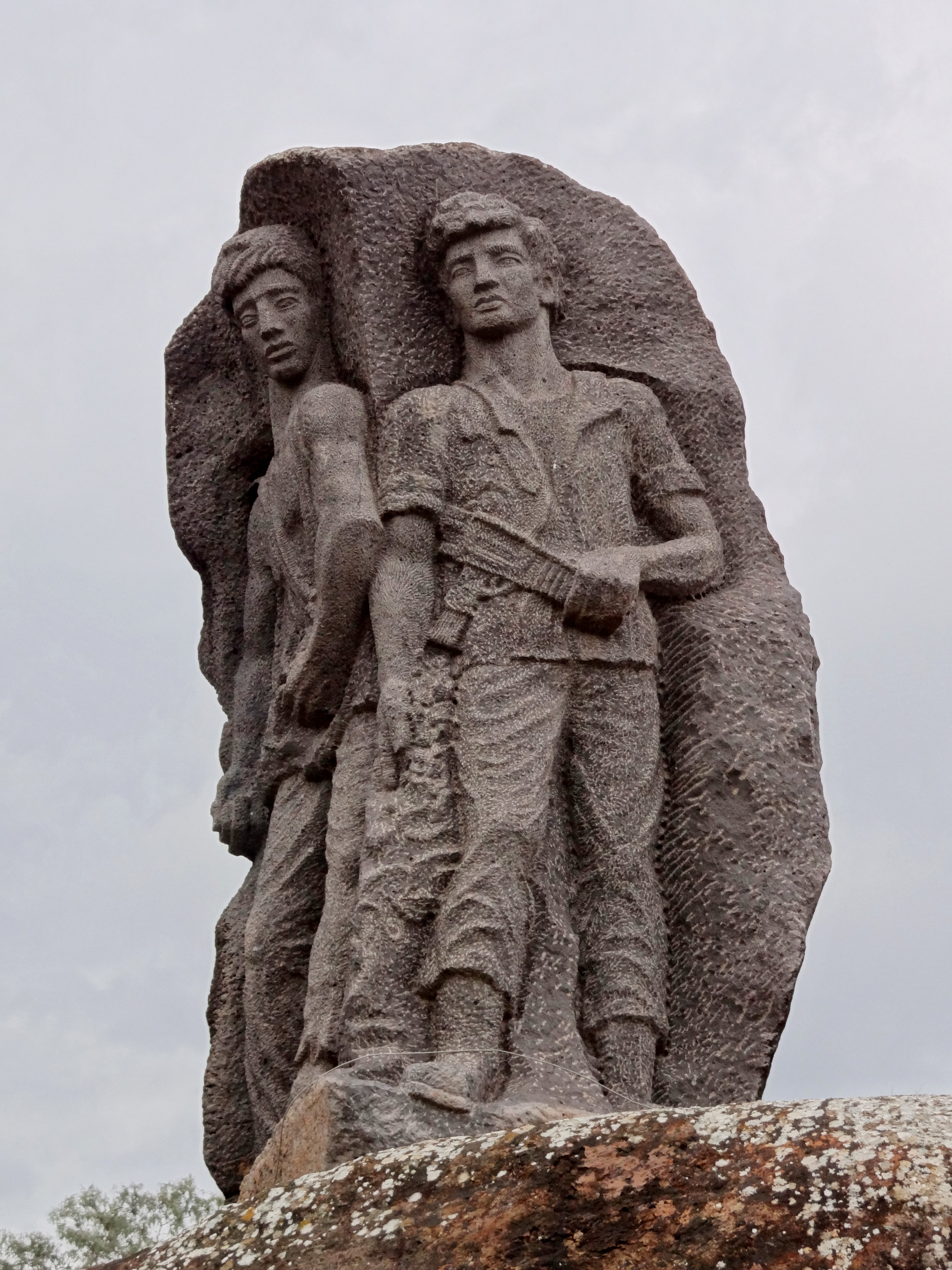 Almagor is a workers' moshav in the Upper Galilee in northern Israel. אלמגור הינו מושב במדרונות רמת כורזים מצפון לכנרת, בתחום המועצה האזורית עמק הירדן. אנדרטה בכניסה ליישוב לזכר אבינועם אבנשטיין ואבי רייף שנפלו באלמגור בשנת תשכ"ז. ולזכר חמשת בני המקום שנפלו על גאול המקום, שמואל לוי, עמיקם שמאי, פטר פביאן, חיים פרץ יהושע לוי הפסל: מ. כפרי לבנה